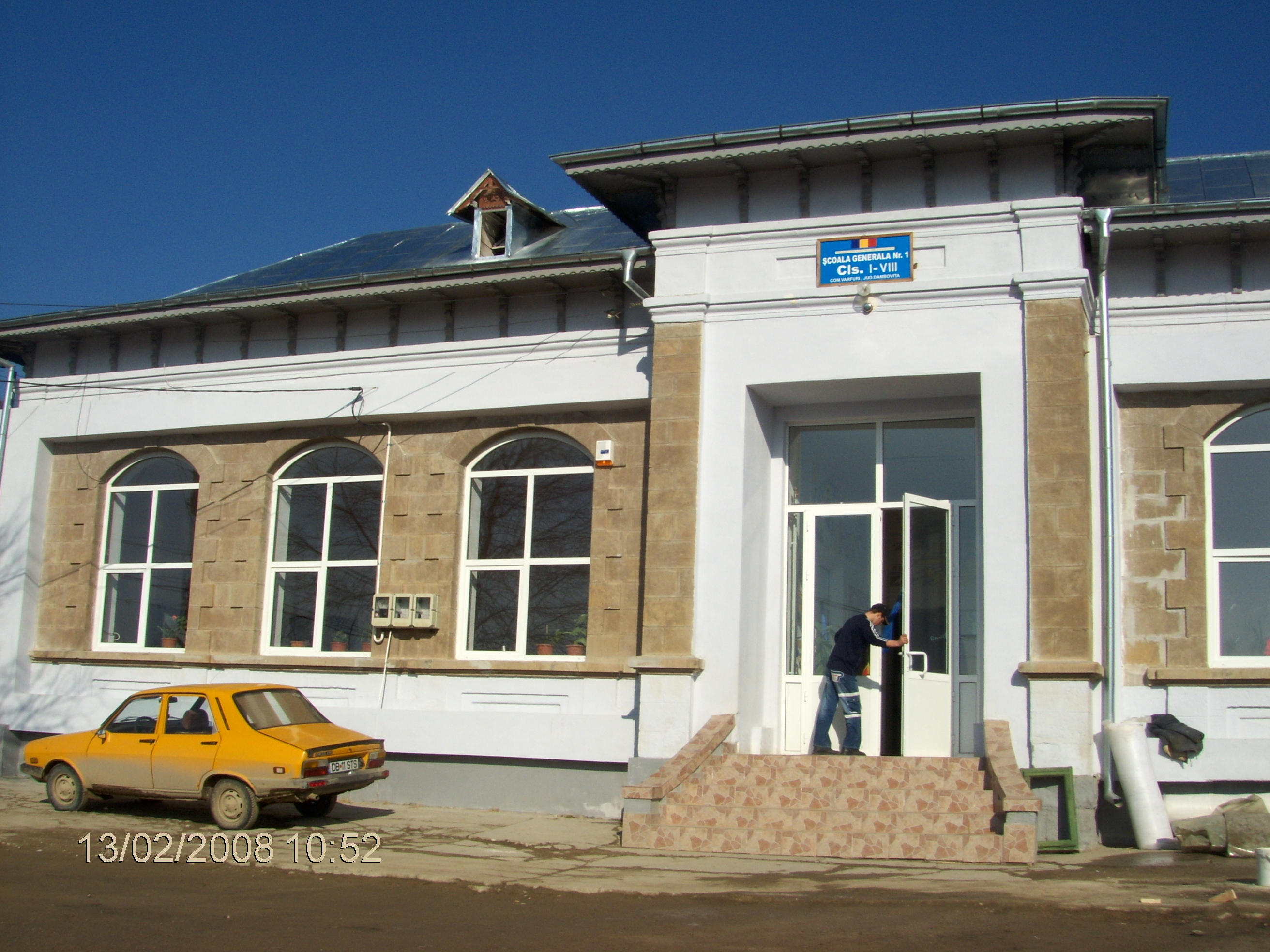 Scoala generala clasele I-VIII, construita in anul 1905